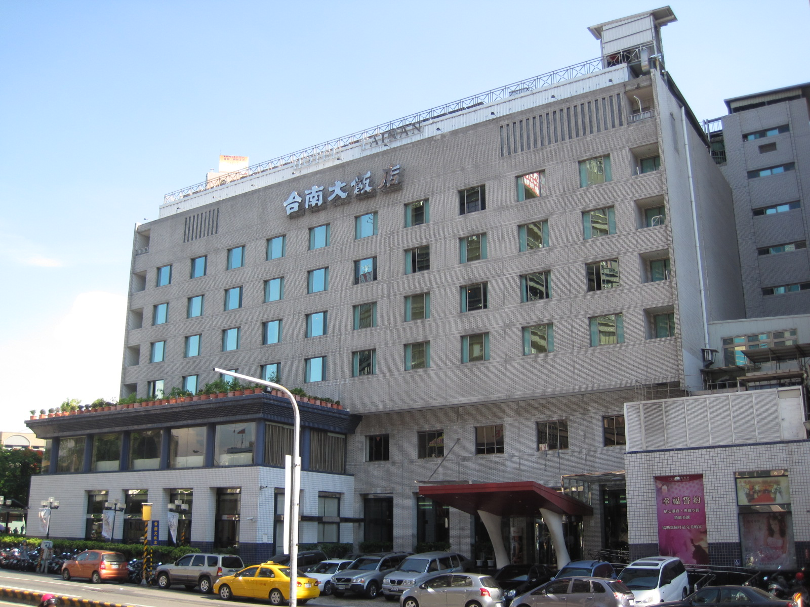 中文（台灣）: 台南大飯店